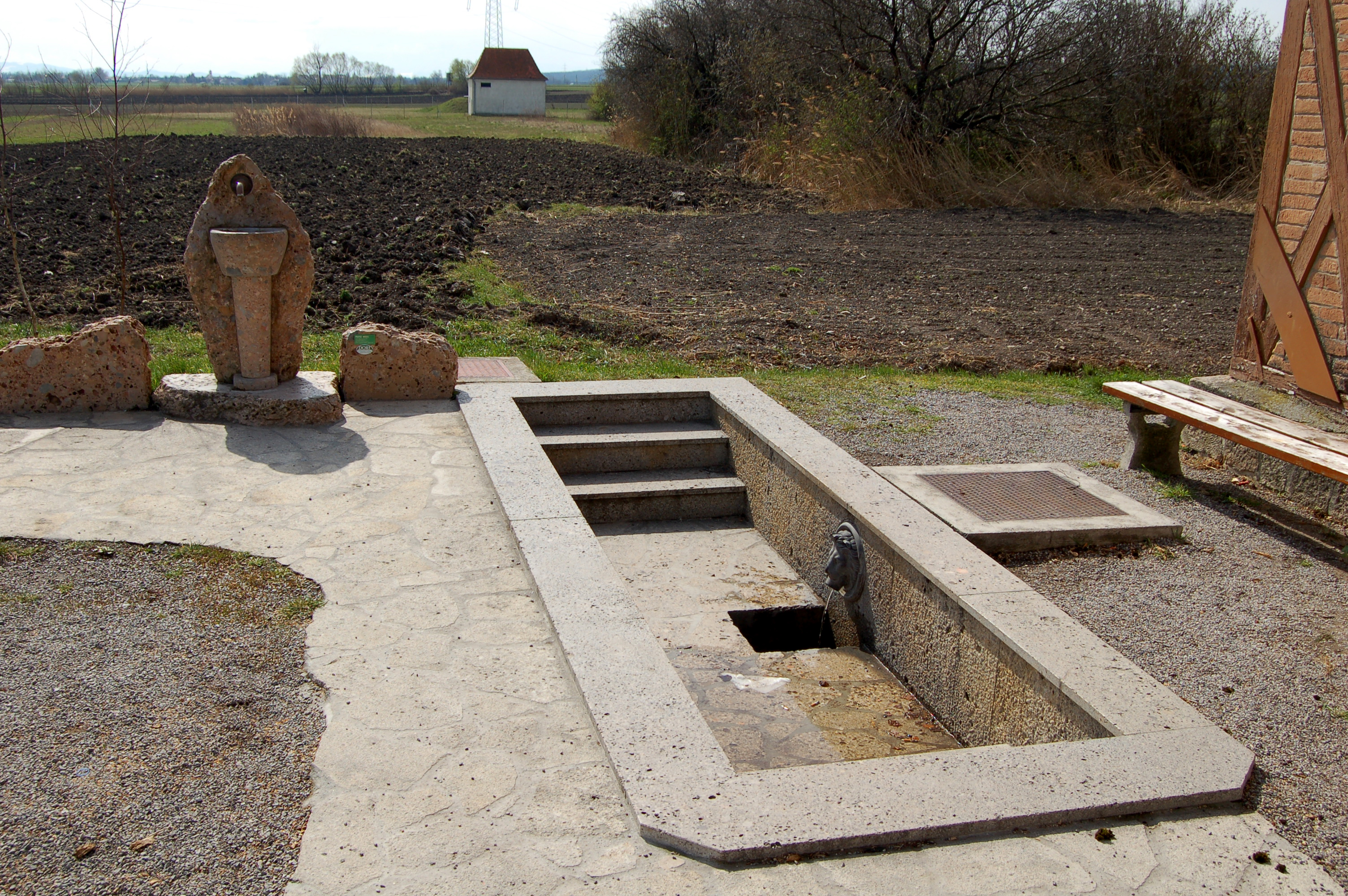 Heilsamer Brunnen, ein Wallfahrtsort in Leobersdorf, Niederösterreich. Neue (links) und alte (rechts) Quellfassung. Blick Richtung Süden